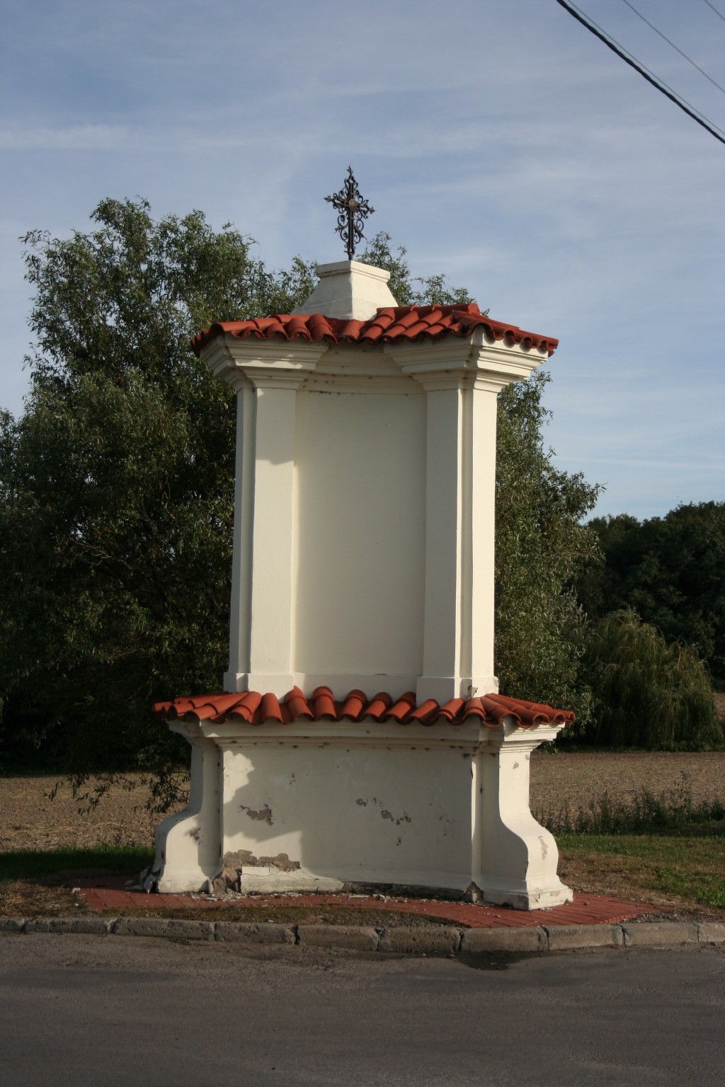 Kapliczka przydrożna (poł. XVIII) Bychawa ul. Zamkowa